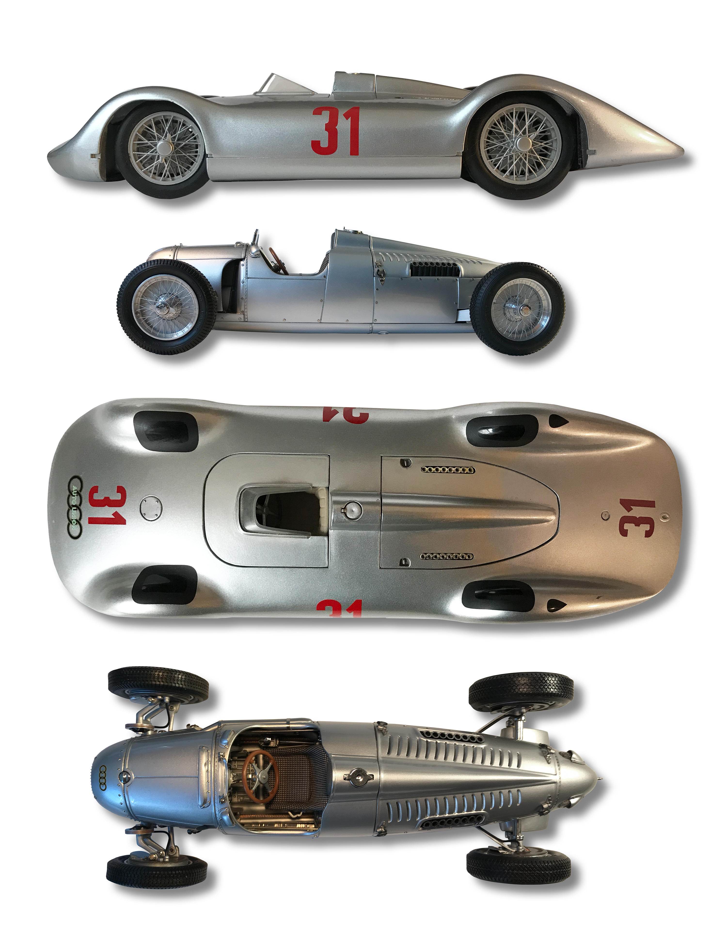 Vergleich des Auto-Union-Rennwagen Typ C (Stromlinie) mit dem Basismodell